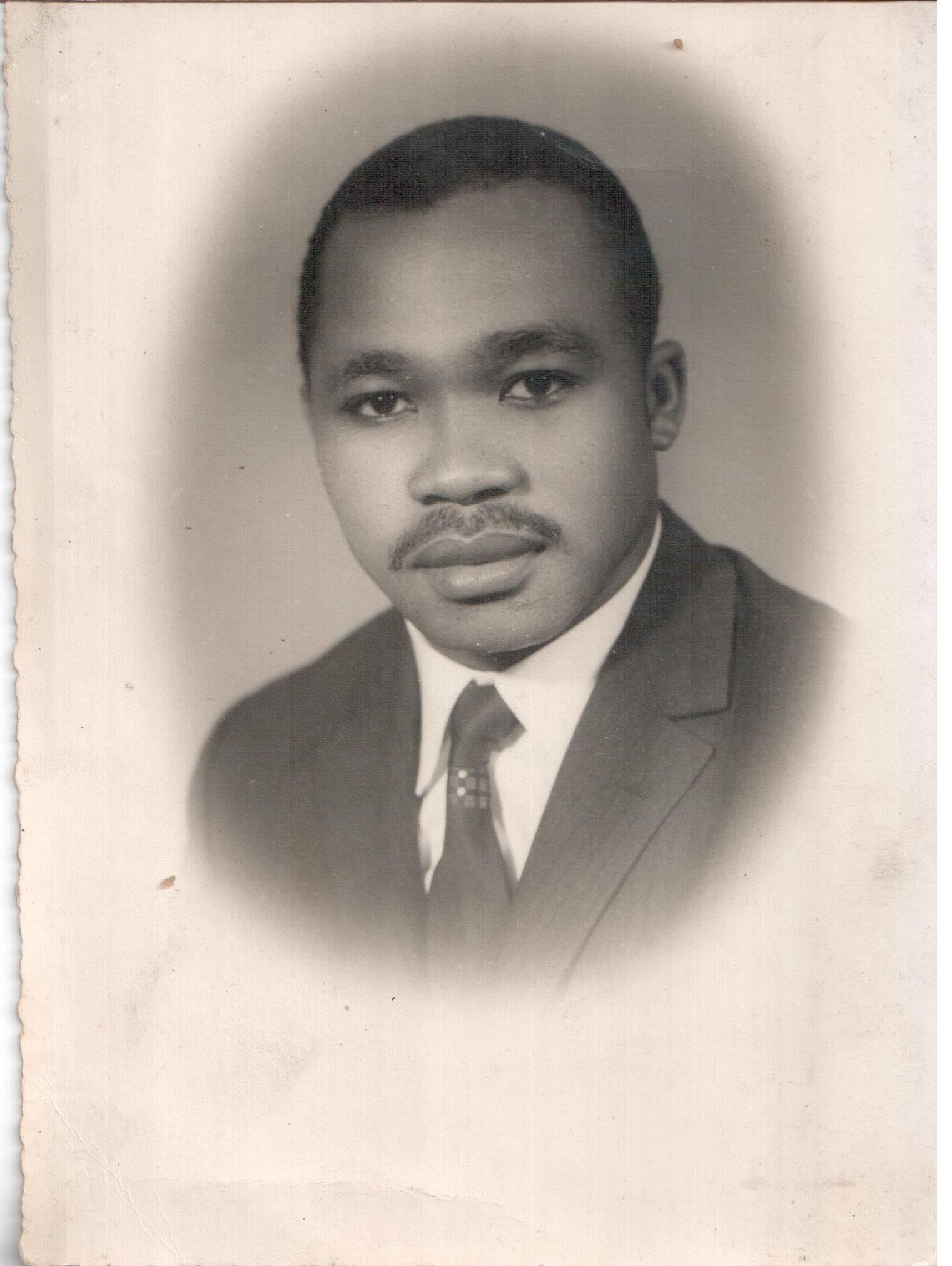 photo du Général Tauthui jeune